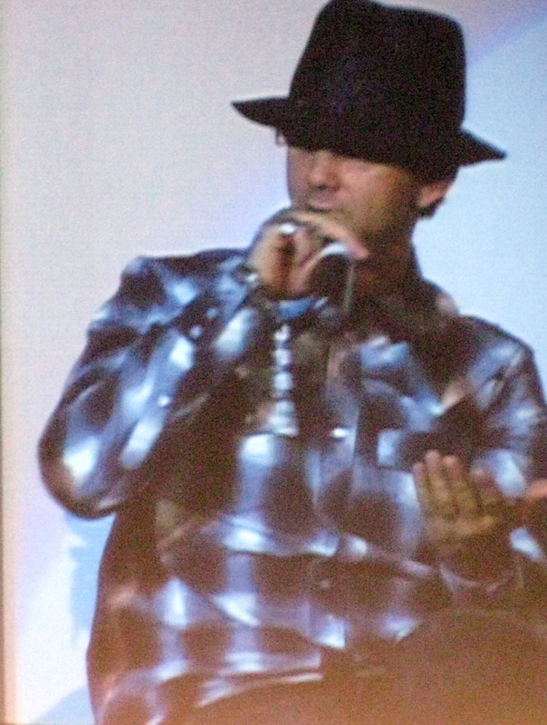 Jeffrey Sebelia